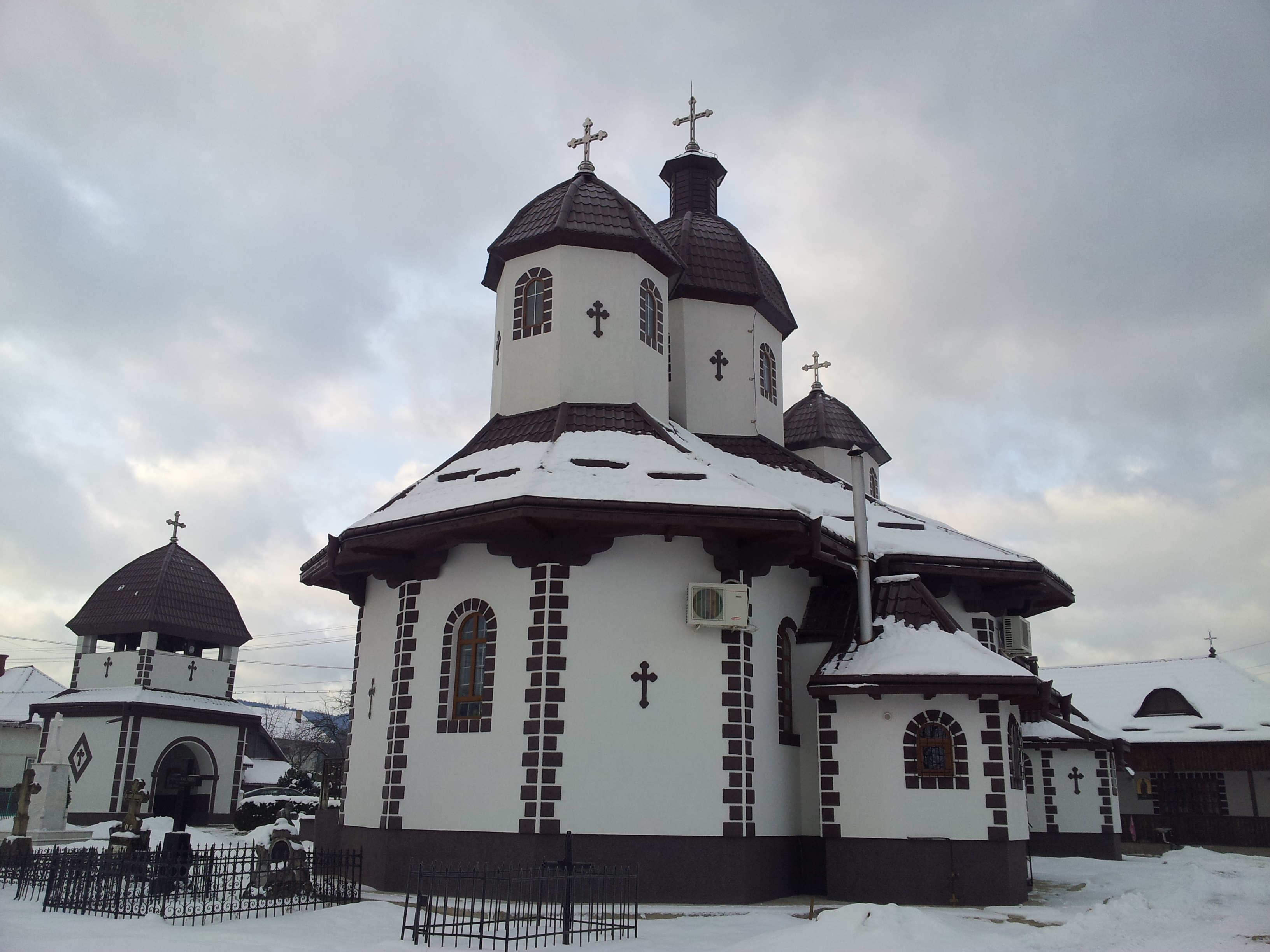 Biserica a fost dăruită de credincioșii din parohia Capu Satului Câmpulung pentru credincioșii din Frasin – Bucșoaia și reconstruită pe actualul amplasament in anul 1854.